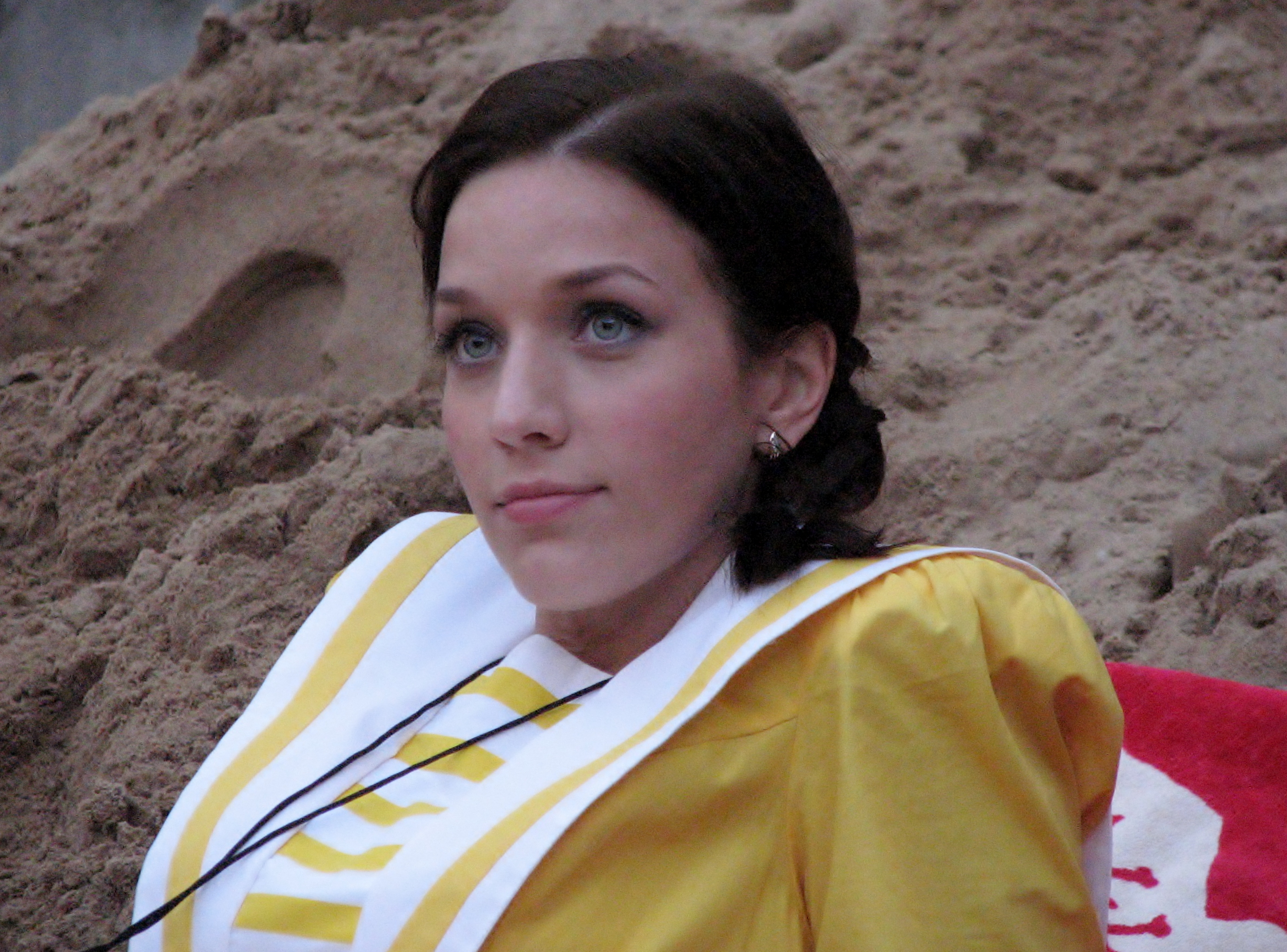 Liis Lass Tallinna Linnateatri 48. hooaja avamisel